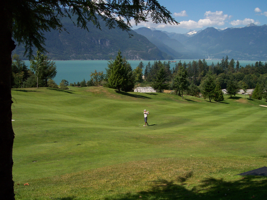 go zone